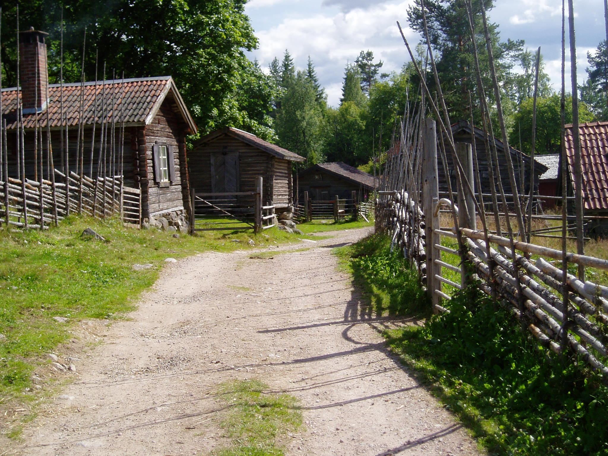 Detta är en vy från huvudgatan på Bastberget.